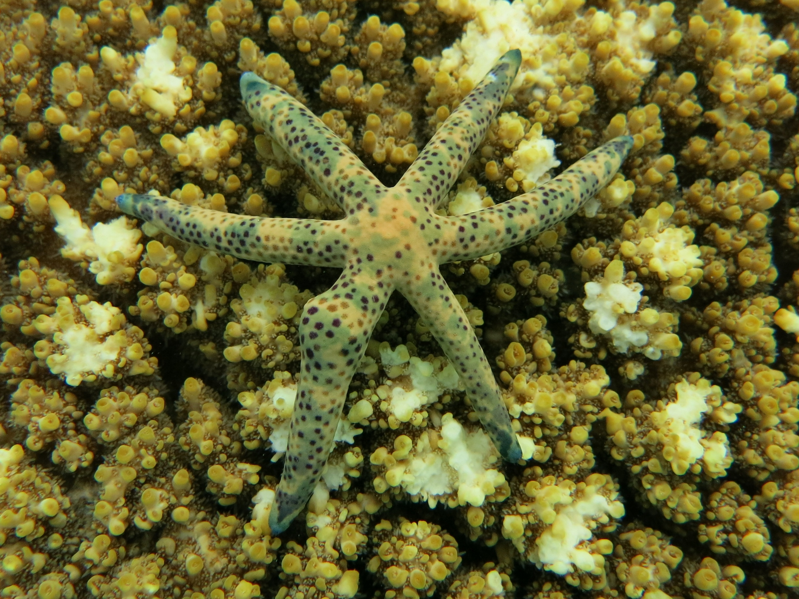 Une étoile "comète de mer" (Linckia multifora) à 6 bras aux Maldives (Landaagiraavaru, atoll de Baa).